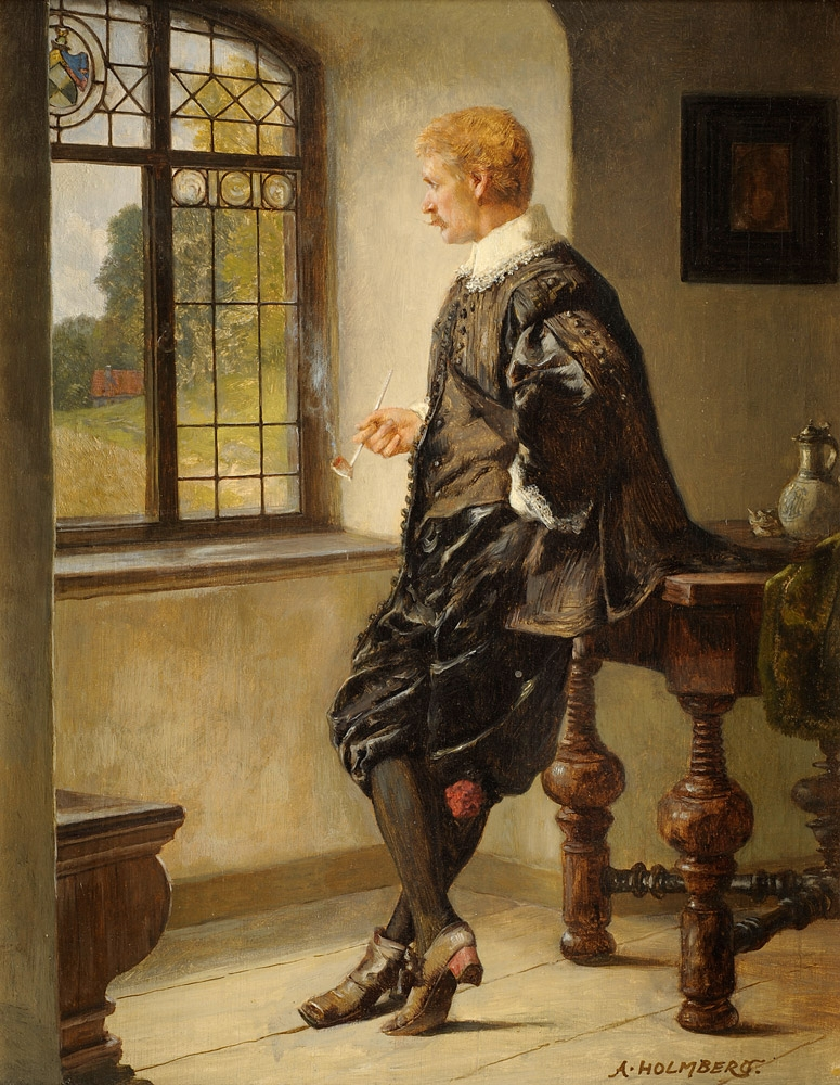 Interieur mit rauchendem Edelherrn. Signiert. Öl/Lwd., 31 x 24 cm.